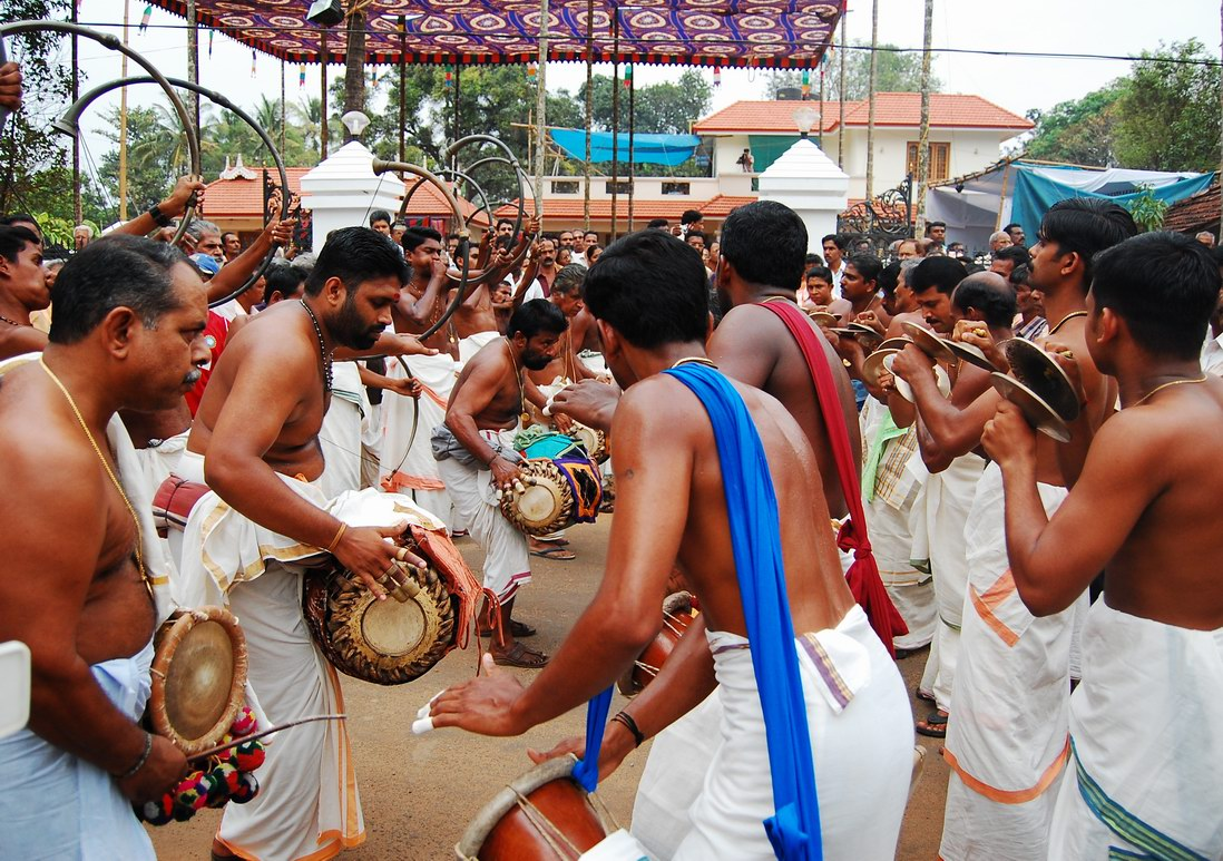 പഞ്ചവാദ്യം